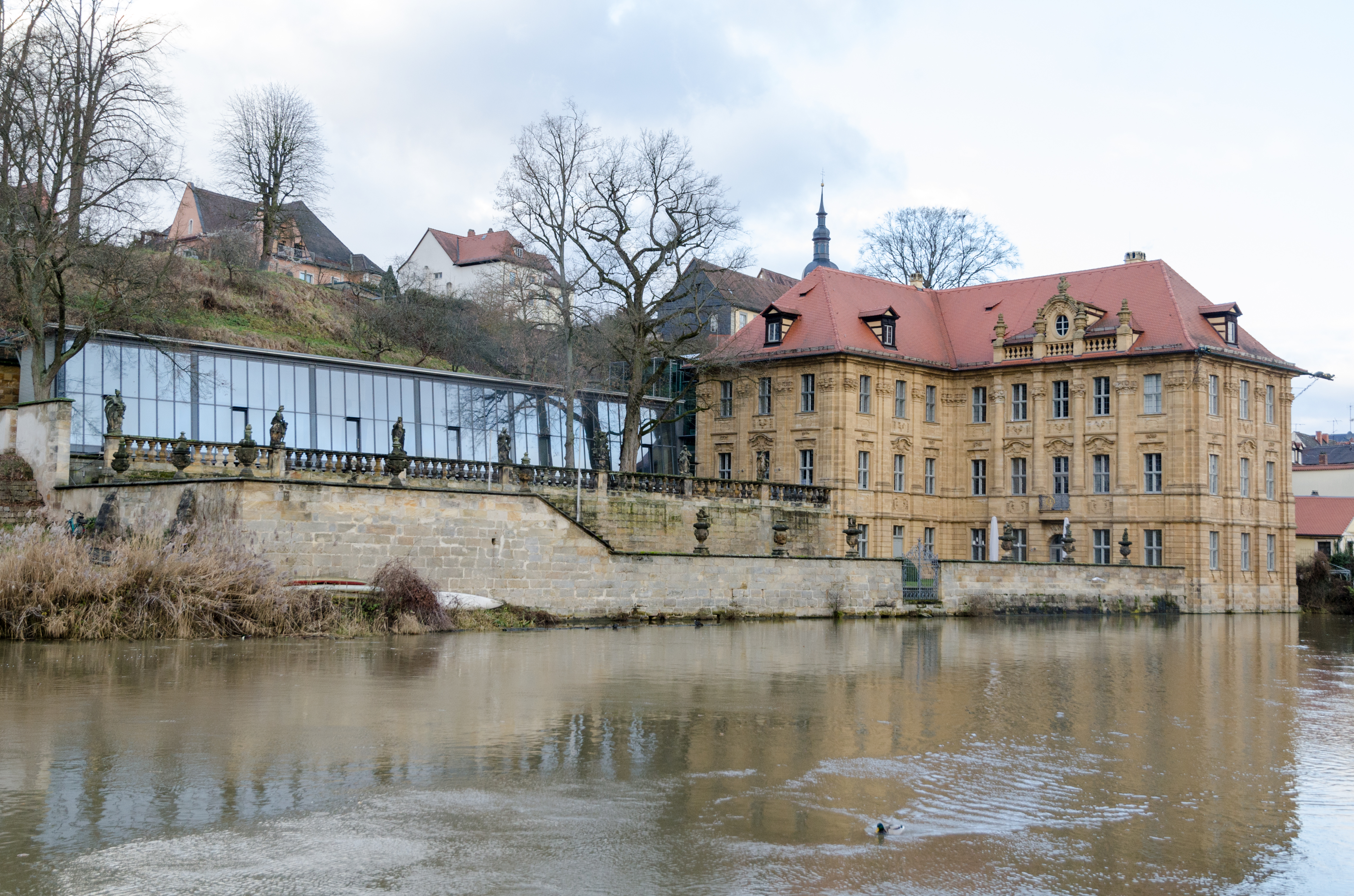 Zweites Böttiger-Palais, seit 1997 Internationale Künstlerhaus Villa Concordia